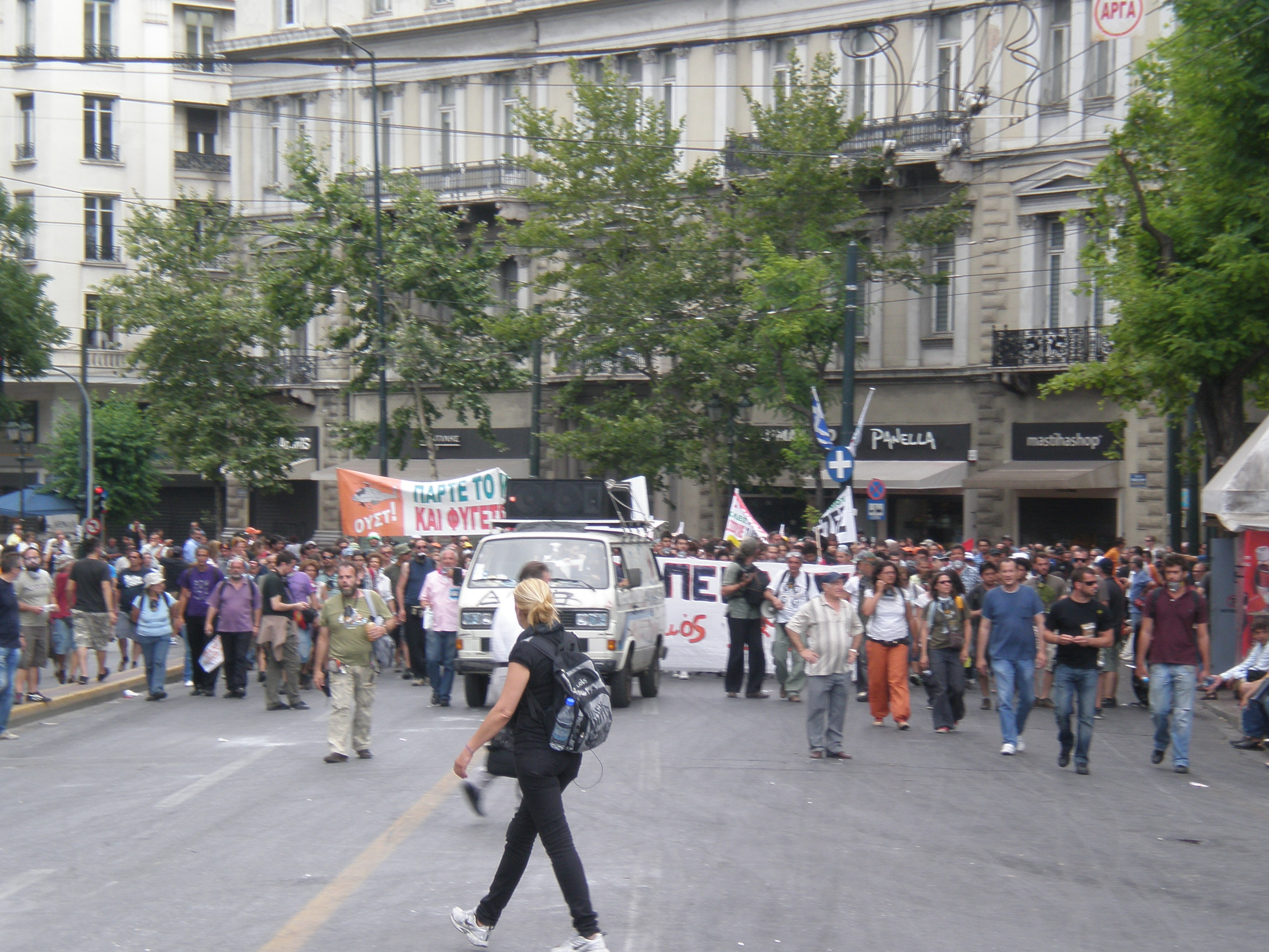 Πορεία των Αγανακτισμένων της Πάτρας προς Σύνταγμα στις 29 Ιούνη 2011